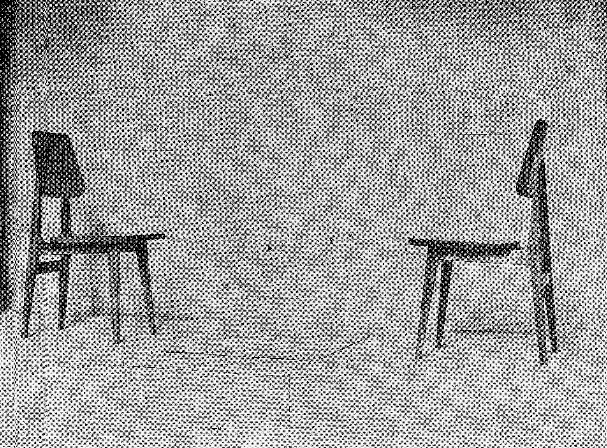 Włodzimierz Borowski, "Dialog" (projekt), 1970. Miejsce prezentacji: Sympozjum Plastyczne Wrocław '70, Wrocław, 1970. Fotografia: najprawdopodobniej Jan Bortkiewicz lub Michał Diament lub Zdzisław Holuka lub Czesław Żuk. Źródło: "Sympozjum Plastyczne Wrocław '70", red. Danuta Dziedzic, Zbigniew Makarewicz, Zjednoczone Przedsiębiorstwa Rozrywkowe Ośrodek Teatru Otwartego "Kalambur", Wrocław 1983, s. 66-67.